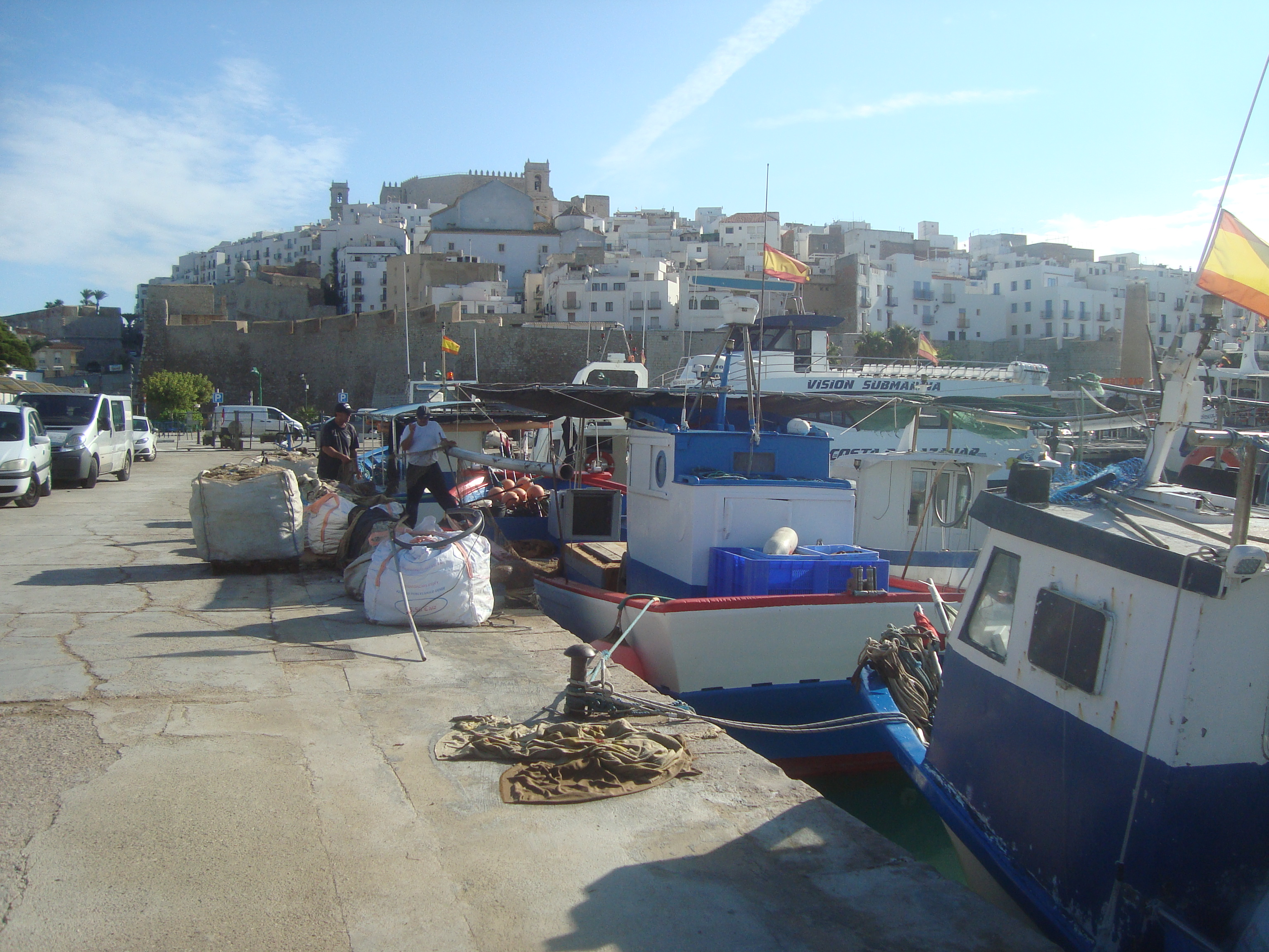 Port maritime de Peñiscola (Castellón)